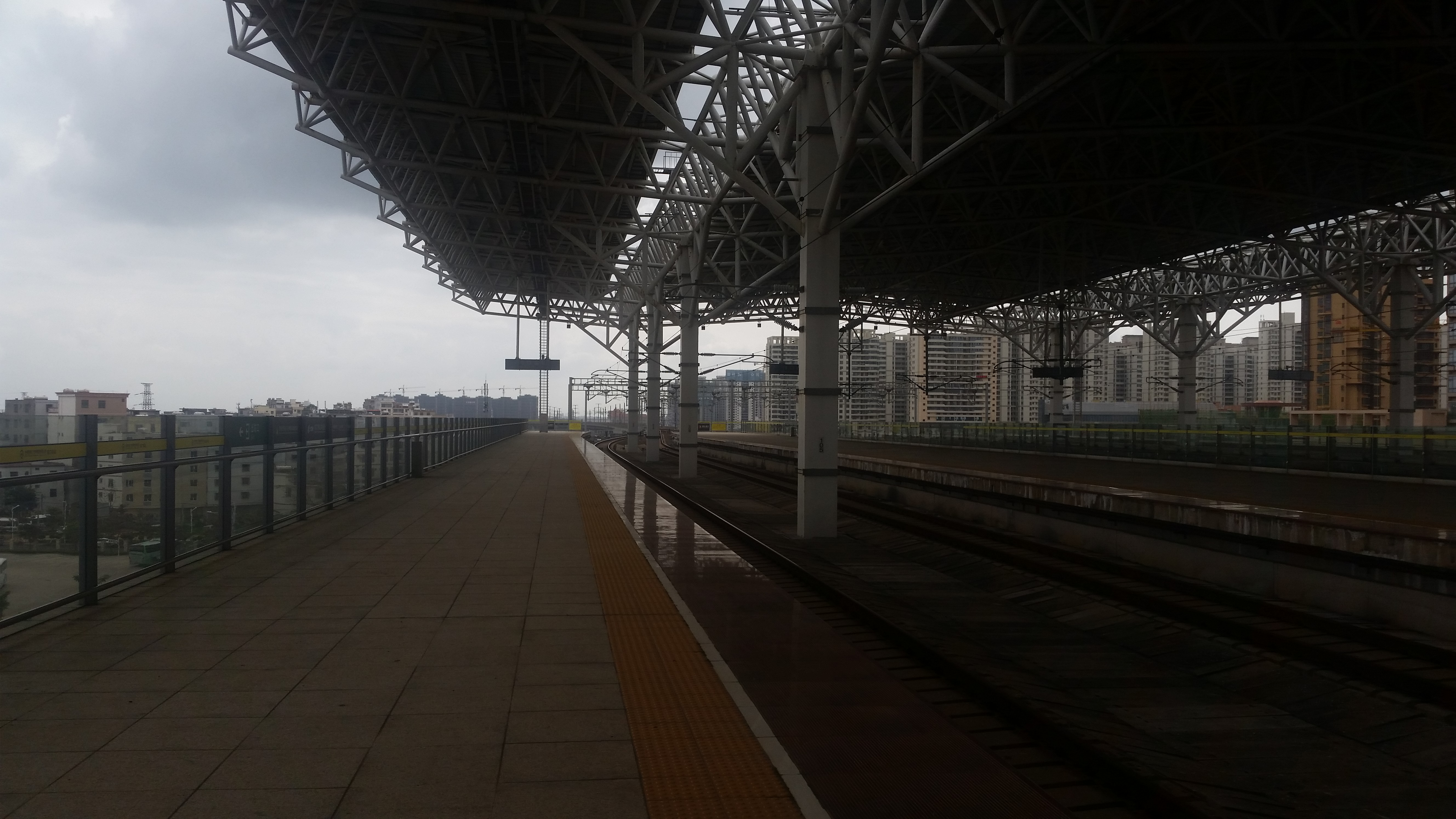 海口东站的站台和到发线